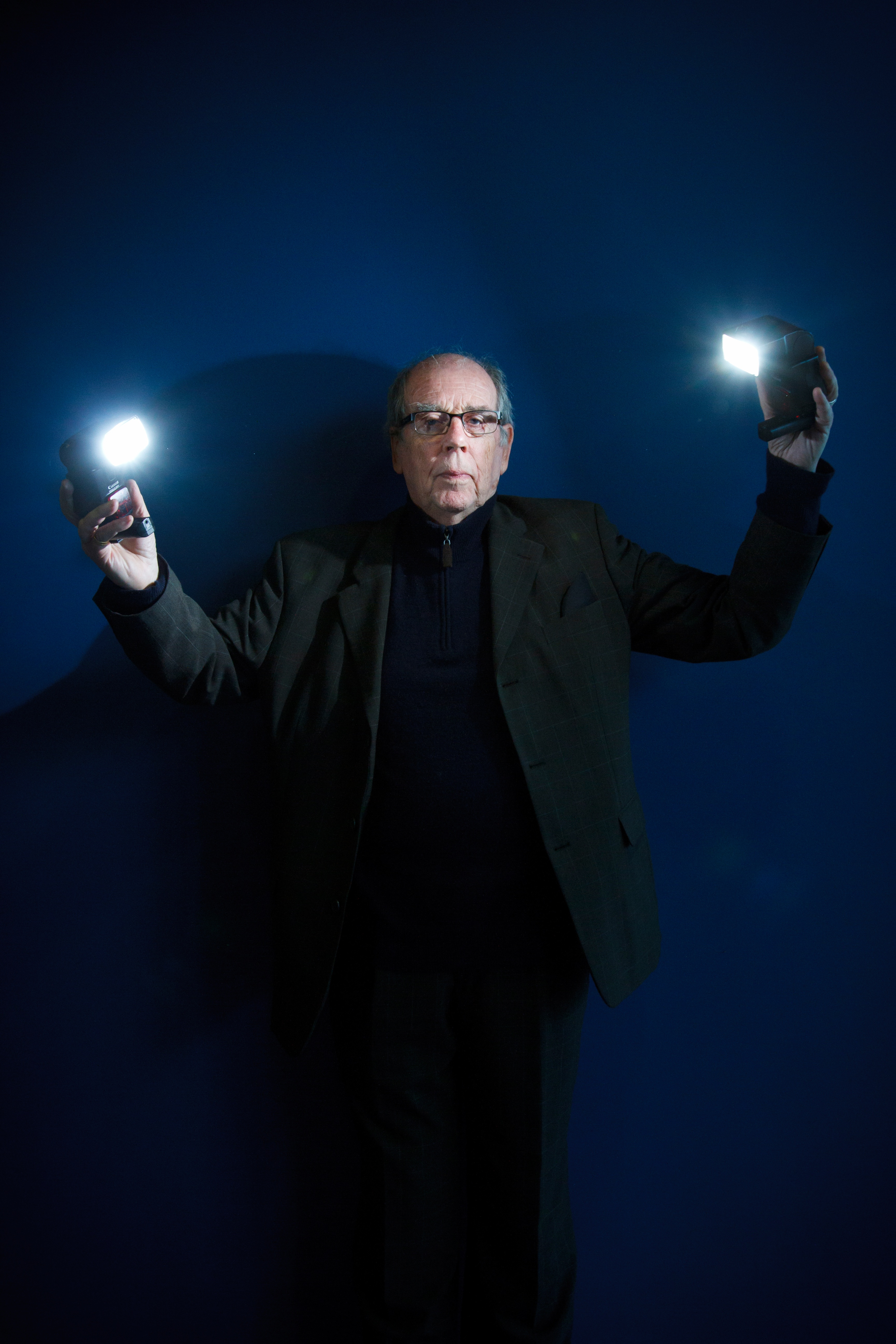 Democracy in Action in Wales – Last night saw the launch of the National Assembly’s photography competition at the University of Wales Newport’s School of Film, Photography and Digital Media Wall Gallery. Democratiaeth ar Waith - Neithiwr, lansiwyd cystadleuaeth ffotograffiaeth y Cynulliad Cenedlaethol yn Oriel y Wal, Ysgol Ffotograffiaeth Ddogfennol Prifysgol Cymru, Casnewydd, ar Gampws y Ddinas.